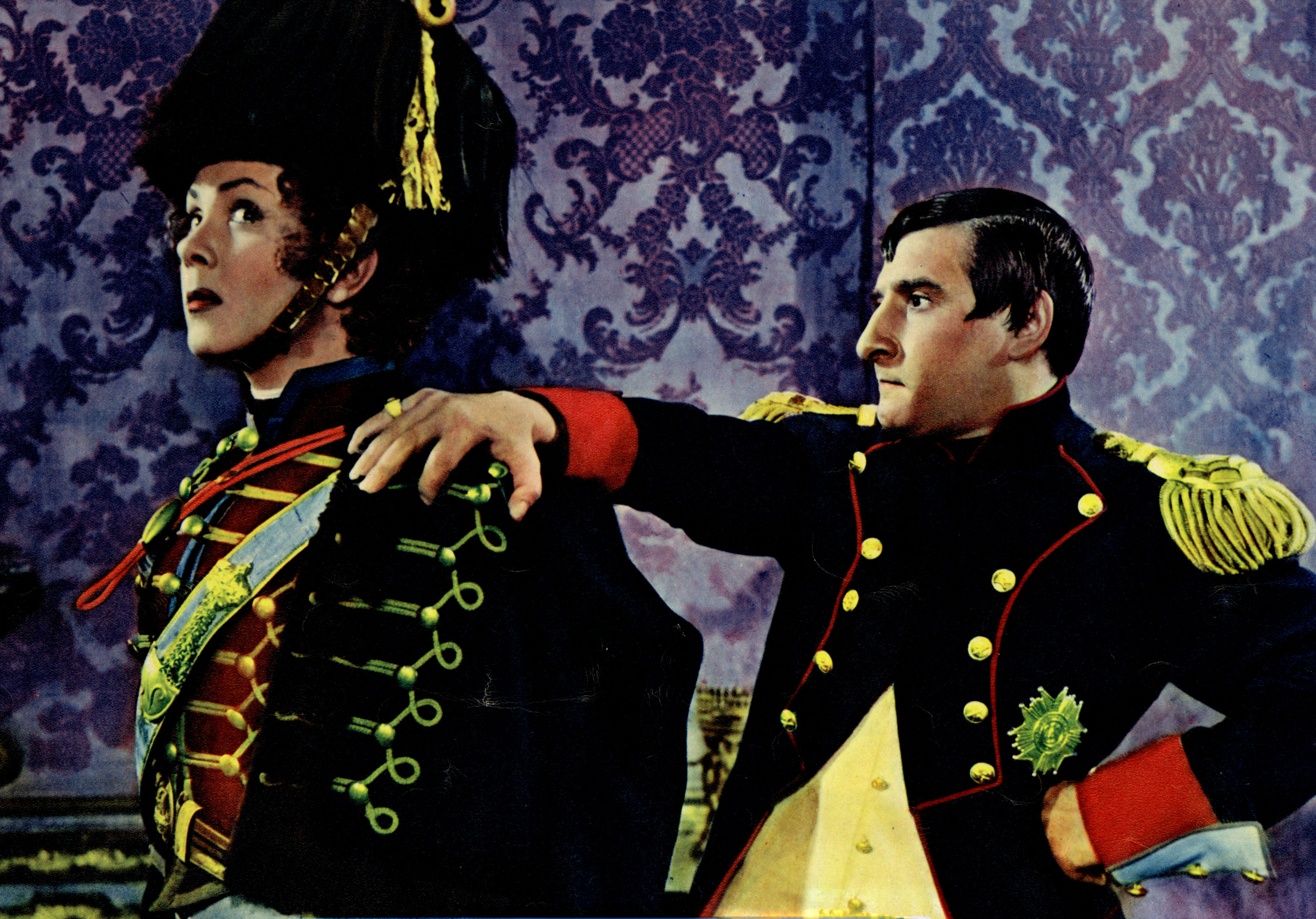 Lilia Silvi e Renato Rascel in una scena del film Napoleone di Carlo Borghesio Licensing 1953